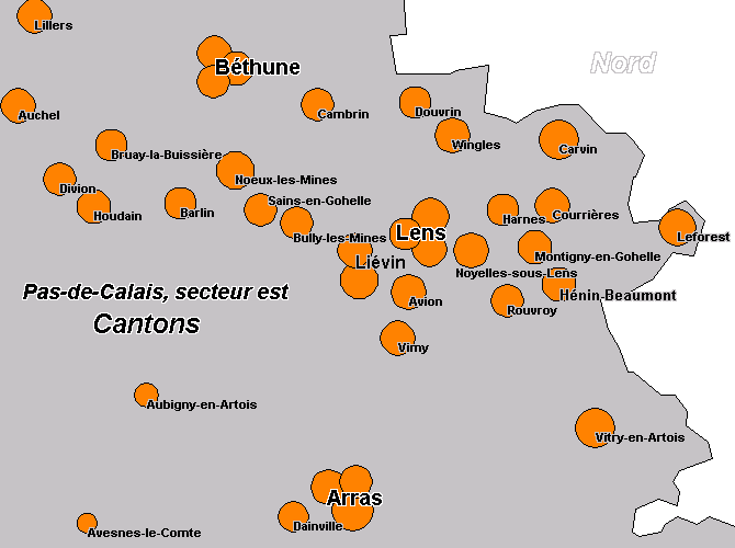 Cantons du secteur est du Pas-de-Calais